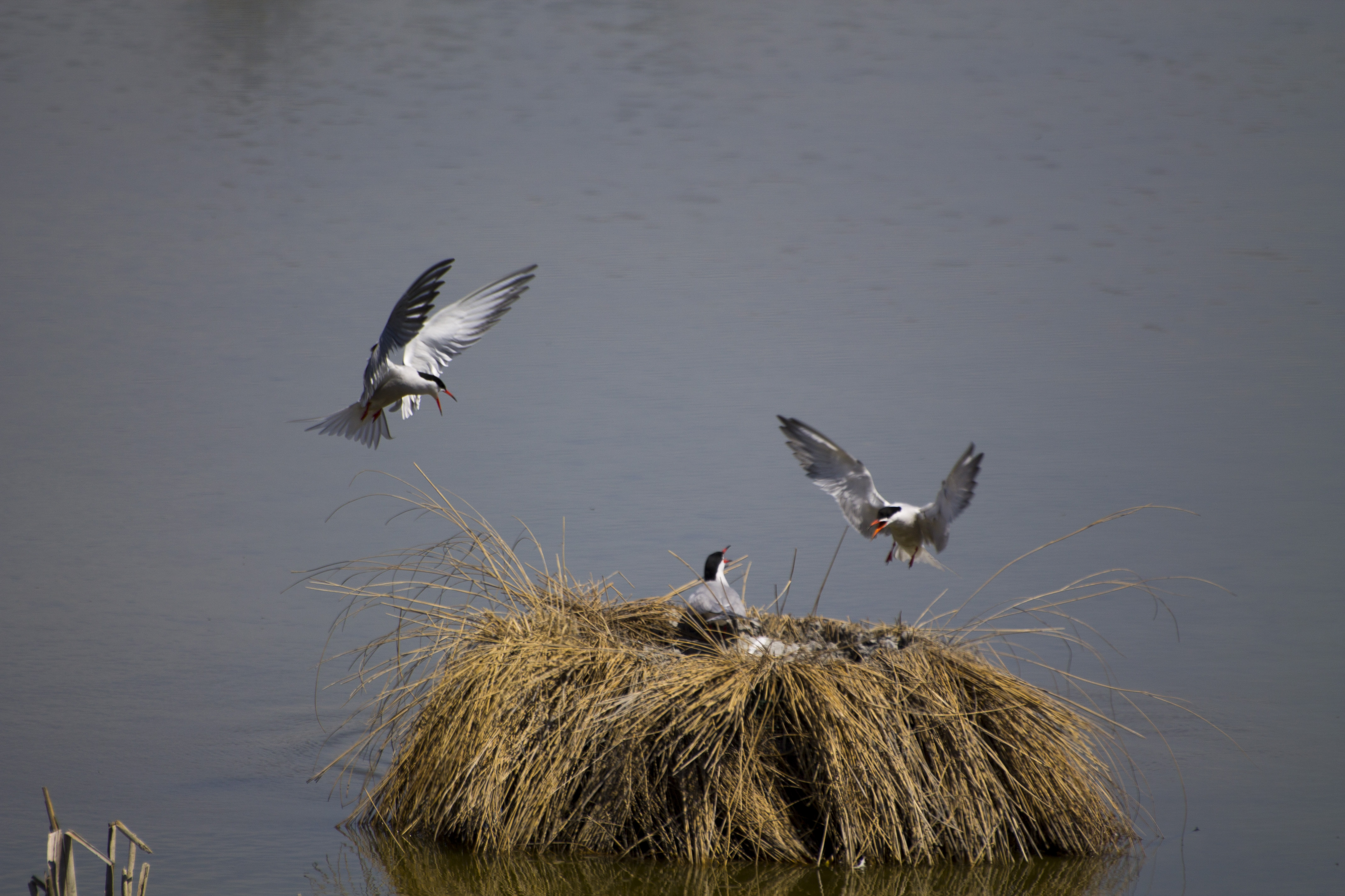 Riet Vell, Delta de l'Ebre This is a photography of a Special Area of Conservation in Spain with the ID: ES0000020. Natura2000 entry, EEA entry